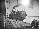 Fotografia tirada, provavelmente no início dos anos 30, do navio a vapor Baependy (ex-Tijuca), afundado pelo submarino alemão U-507 em agosto de 1942.